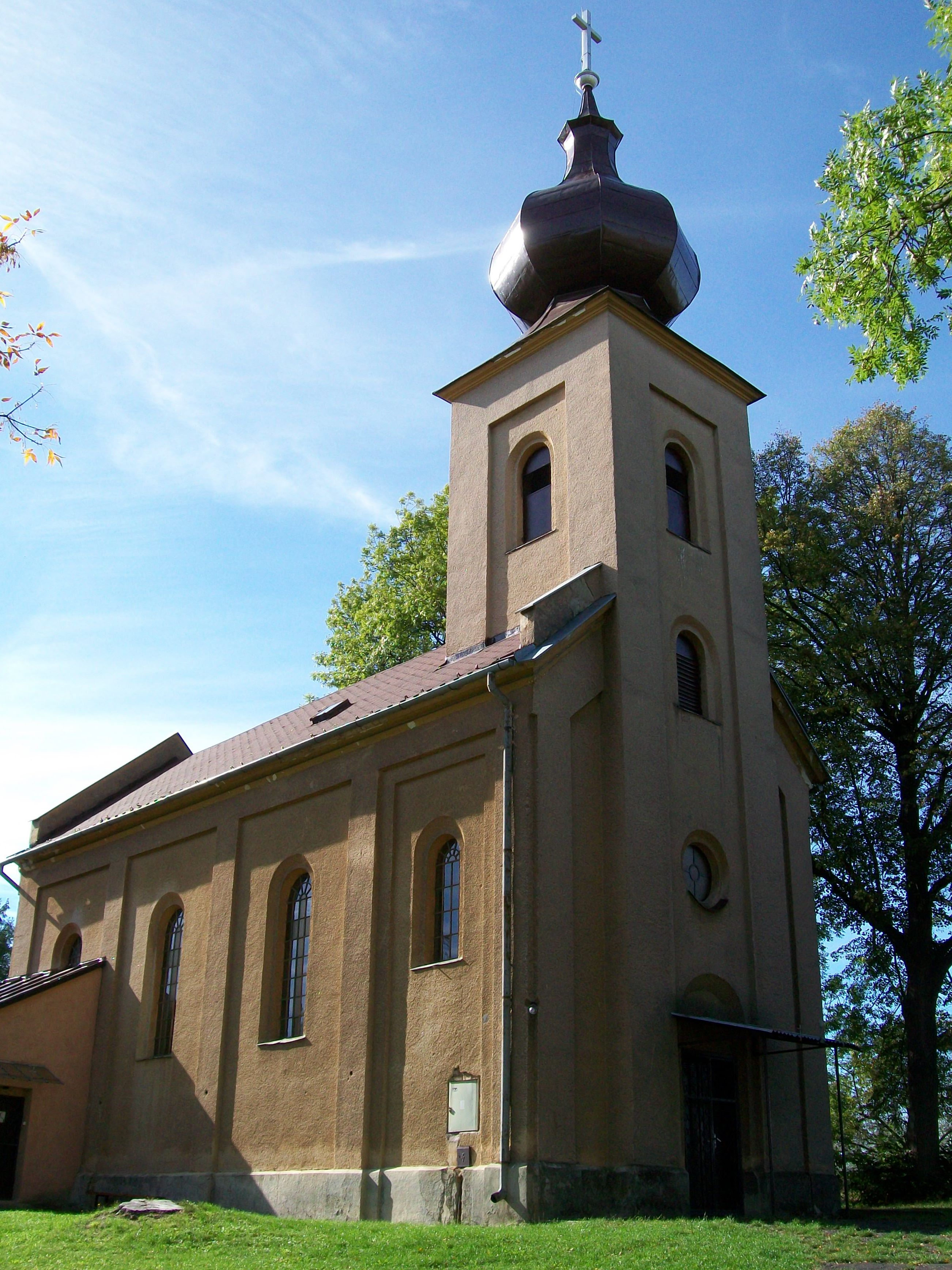 Rímskokatolícky kostol zasvätený Ružencovej Panne Márií, Mikušovce (okr. Lučenec)